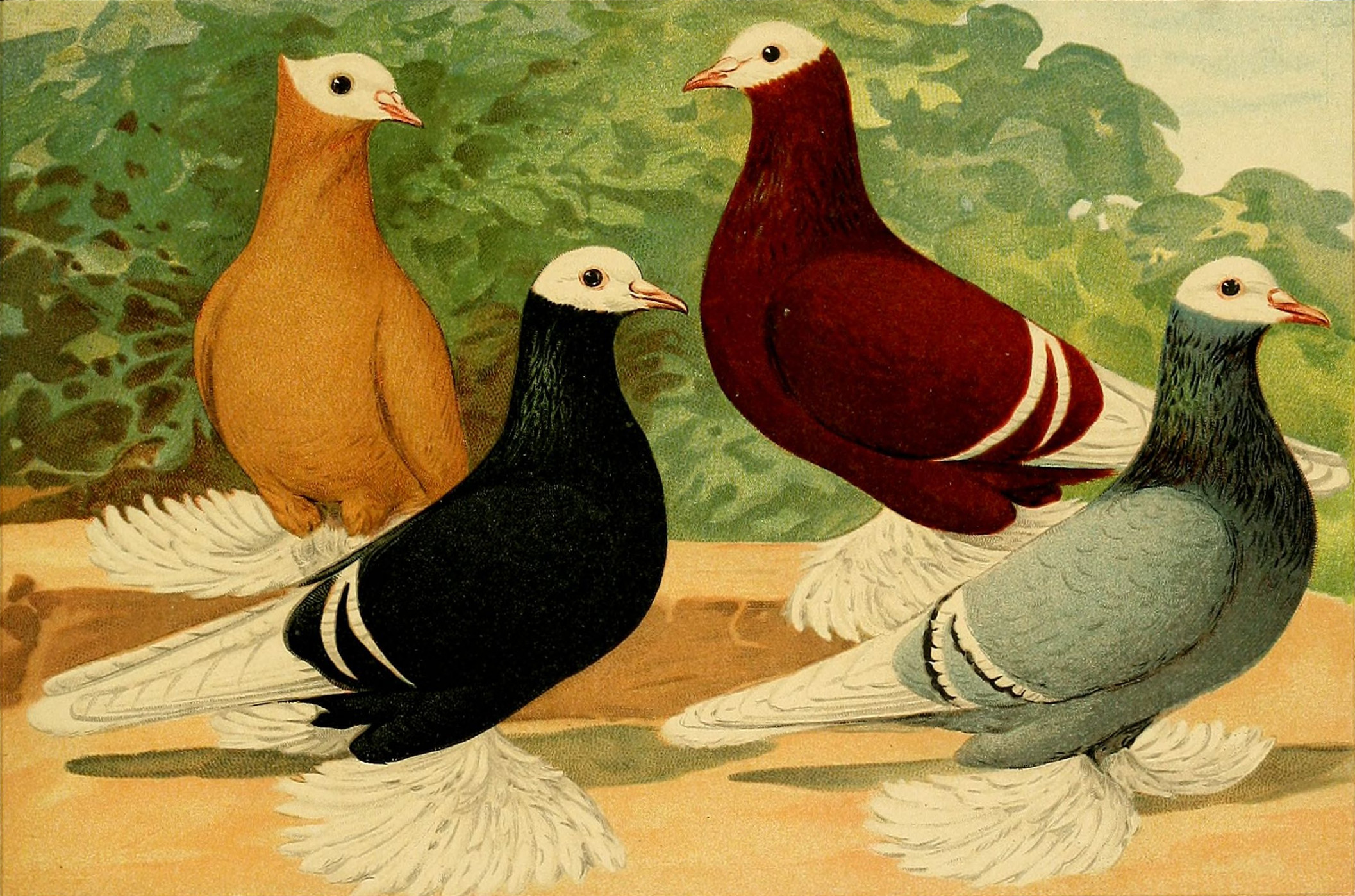 Deutsch